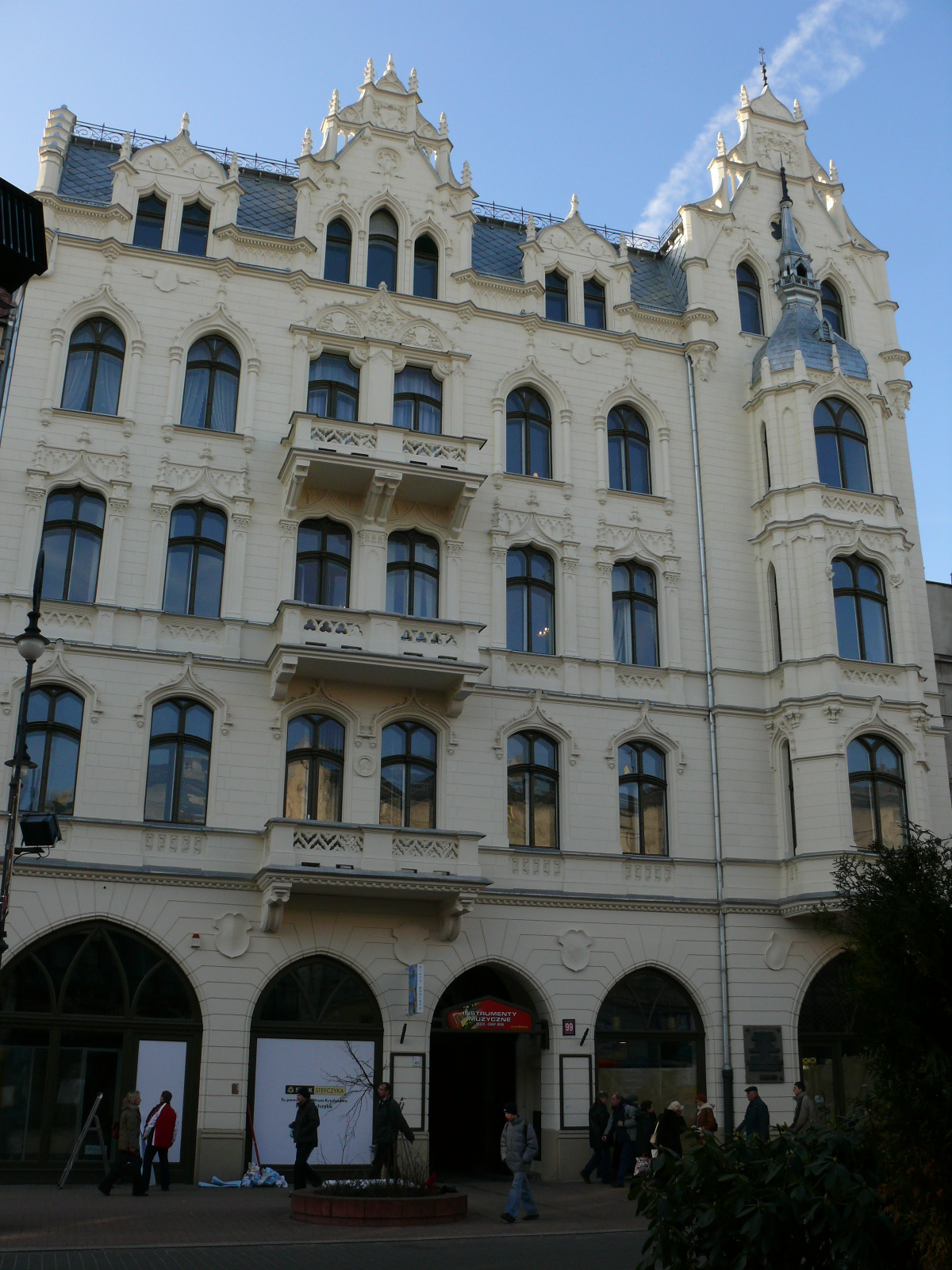 Kamienica Szai Goldbluma, Piotrkowska 99 w Łodzi